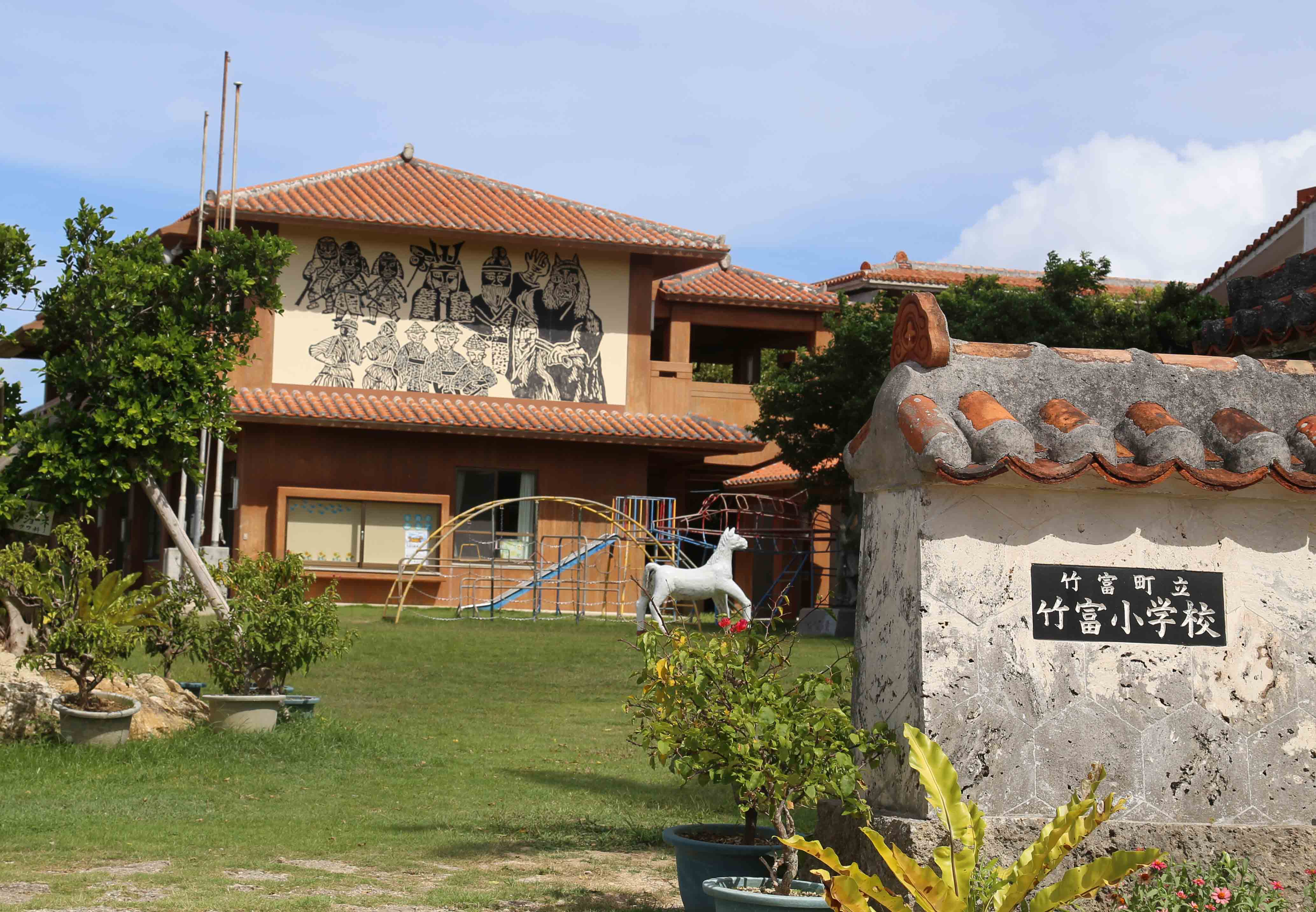 竹富小学校